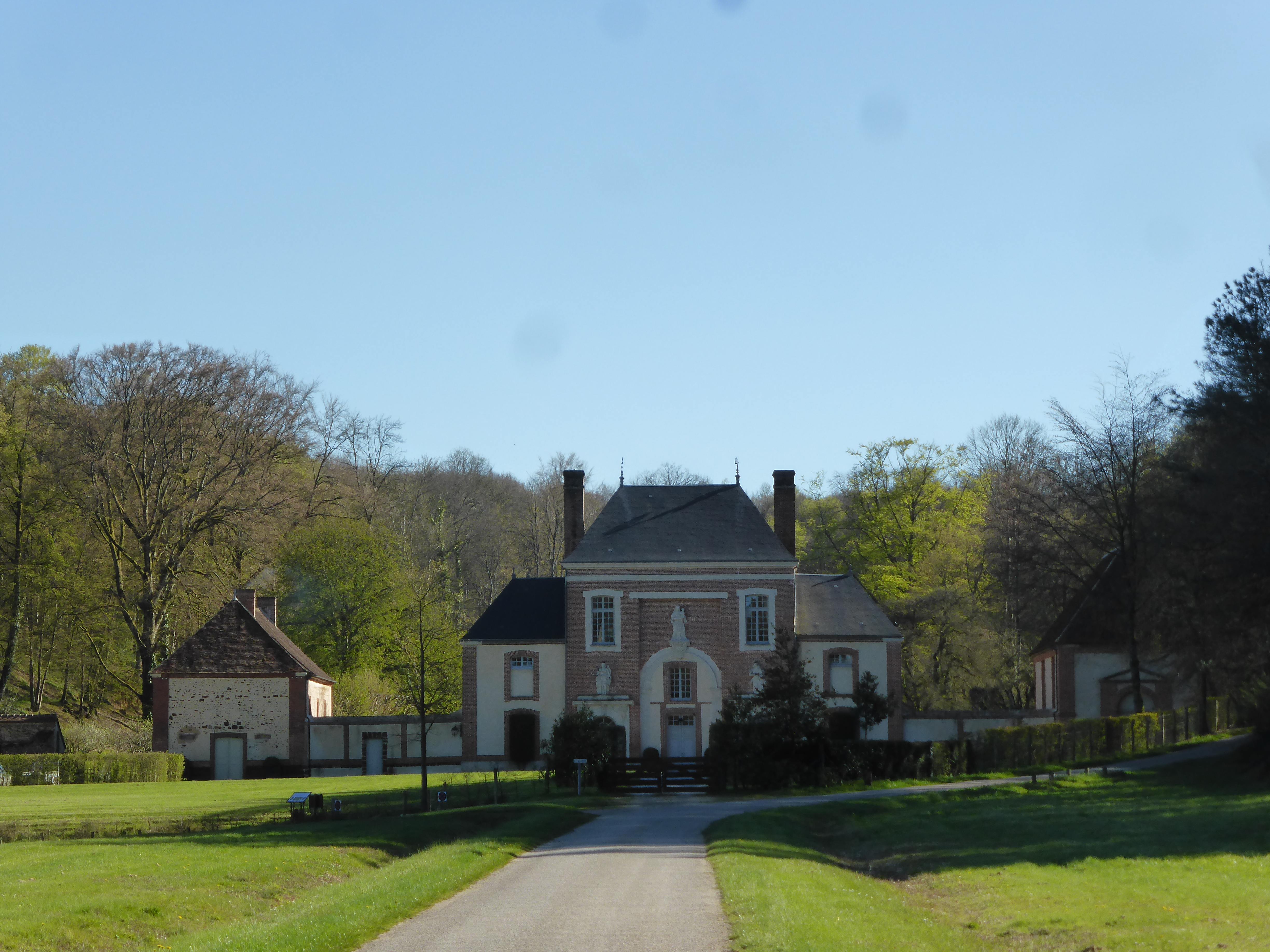 Vestiges de la chartreuse Notre-Dame du Val-Dieu, dans la forêt de Réno-Valdieu. On distingue la pharmacie à gauche, la porterie au centre et la chapelle des femmes à droite.